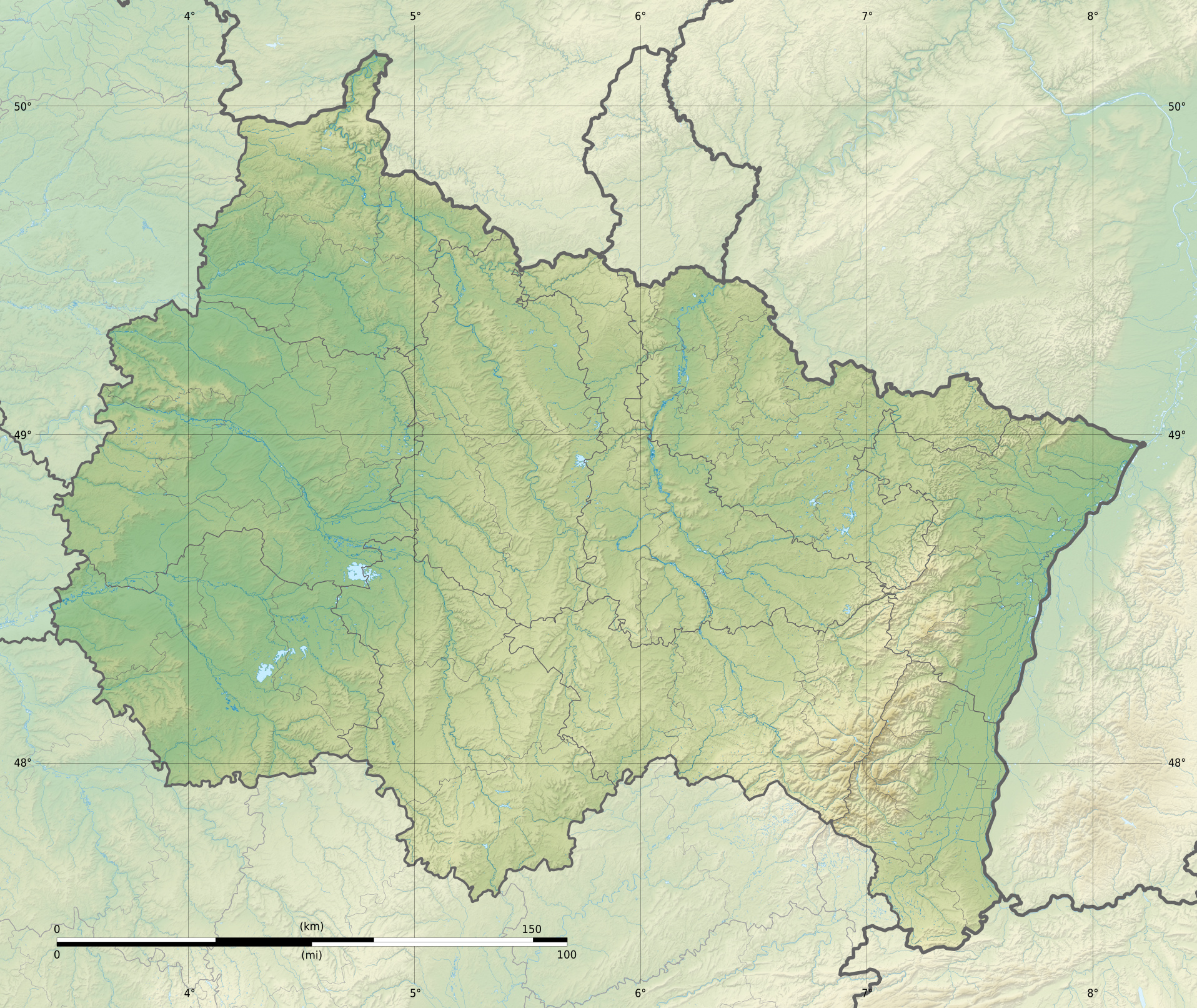 Carte topographique vierge de la région Alsace-Champagne-Ardenne-Lorraine, France, destinée à la géolocalisation. Projection "Géoportail" (projection équirectangulaire à la latitude de référence 46.5° Nord) Limites géogrpahiques de la carte : West: 3.17 E East: 8.465 E North: 50.320 N South: 47.257 N